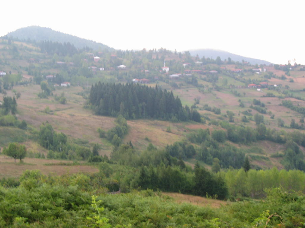 Alancık village of Şenpazar in Kastamonu, Turkey. (Resim tarafımdan çekilmiştir)